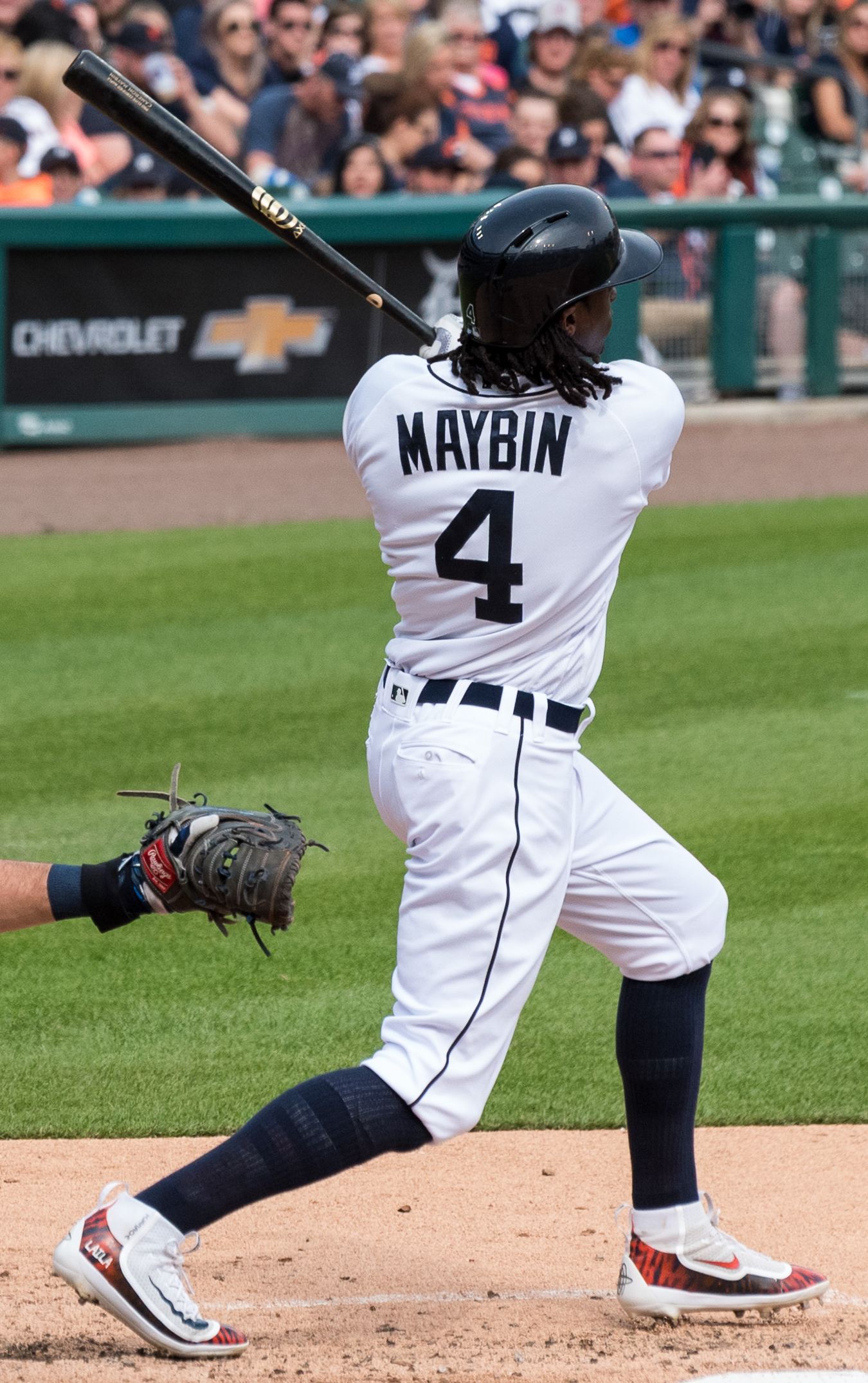 Cameron Maybin